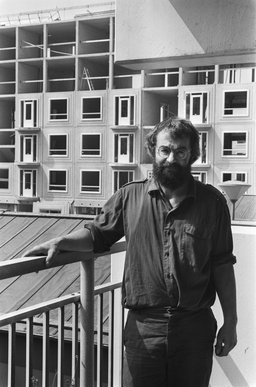 Roel van Duijn woont weer in Amsterdam: Roel van Duijn op het balkon van zijn flat in de Bijlmer